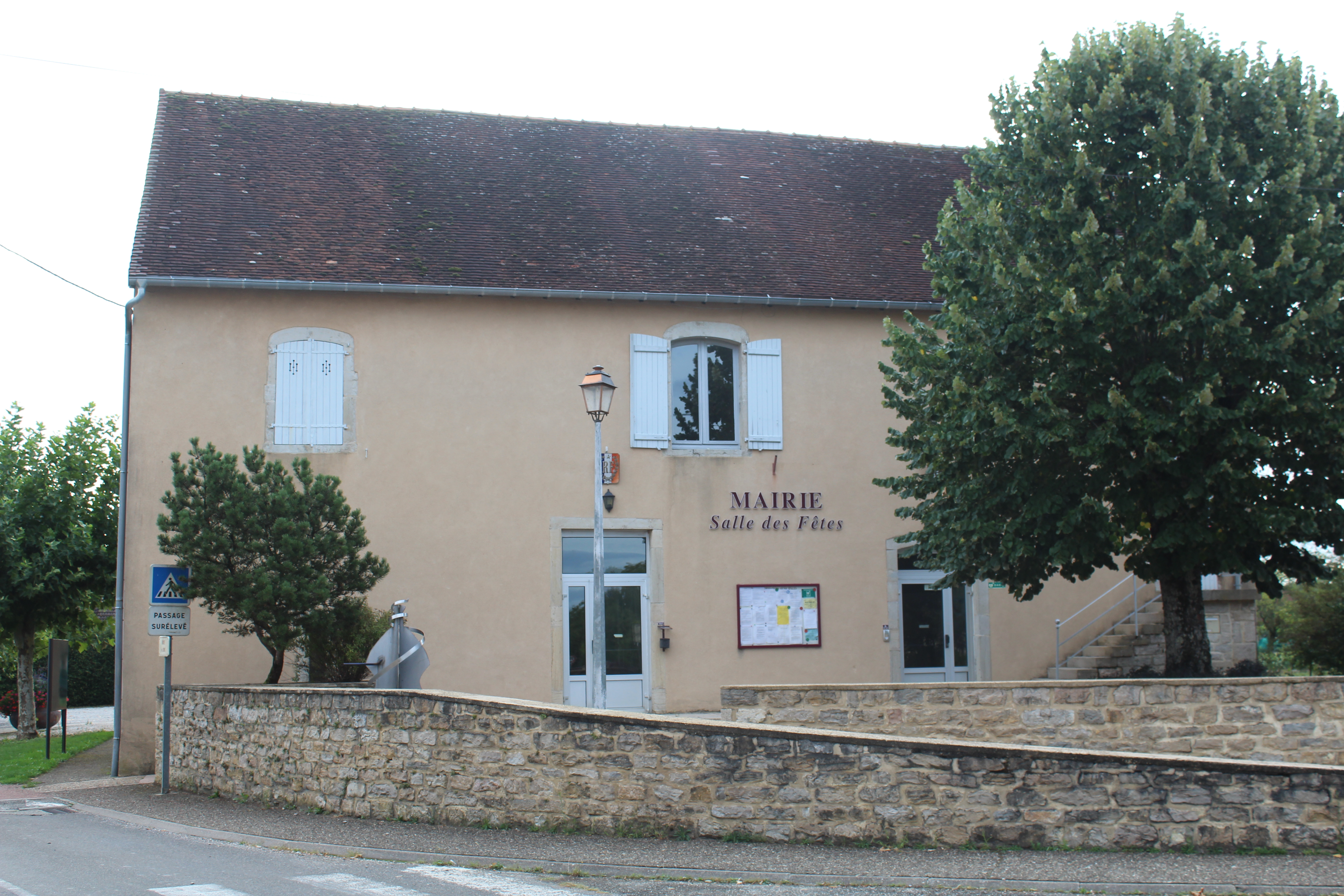 Mairie de Larnaud.